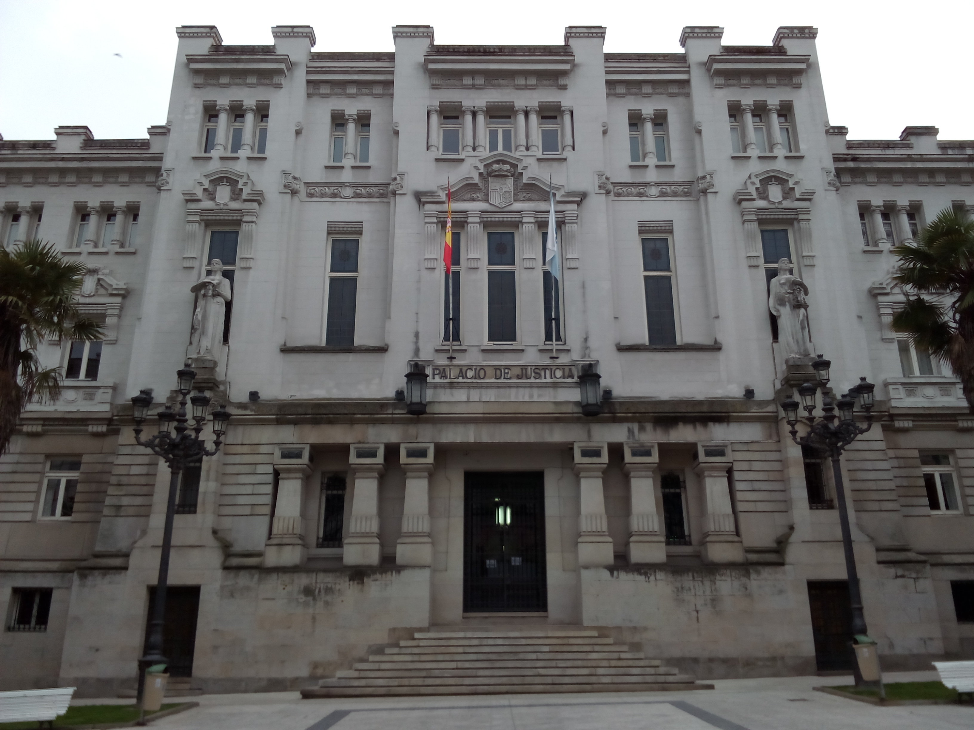 Entrada ao Pazo de Xustiza da cidade da Coruña, sede do Tribunal Superior de Xustiza de Galicia.